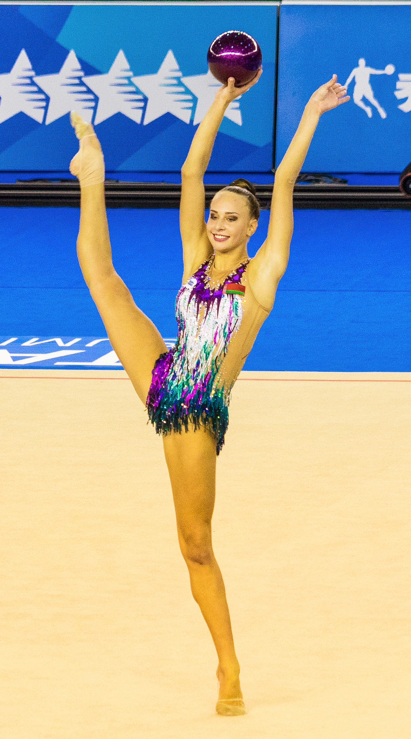 2017 Taipei Summer Universiade